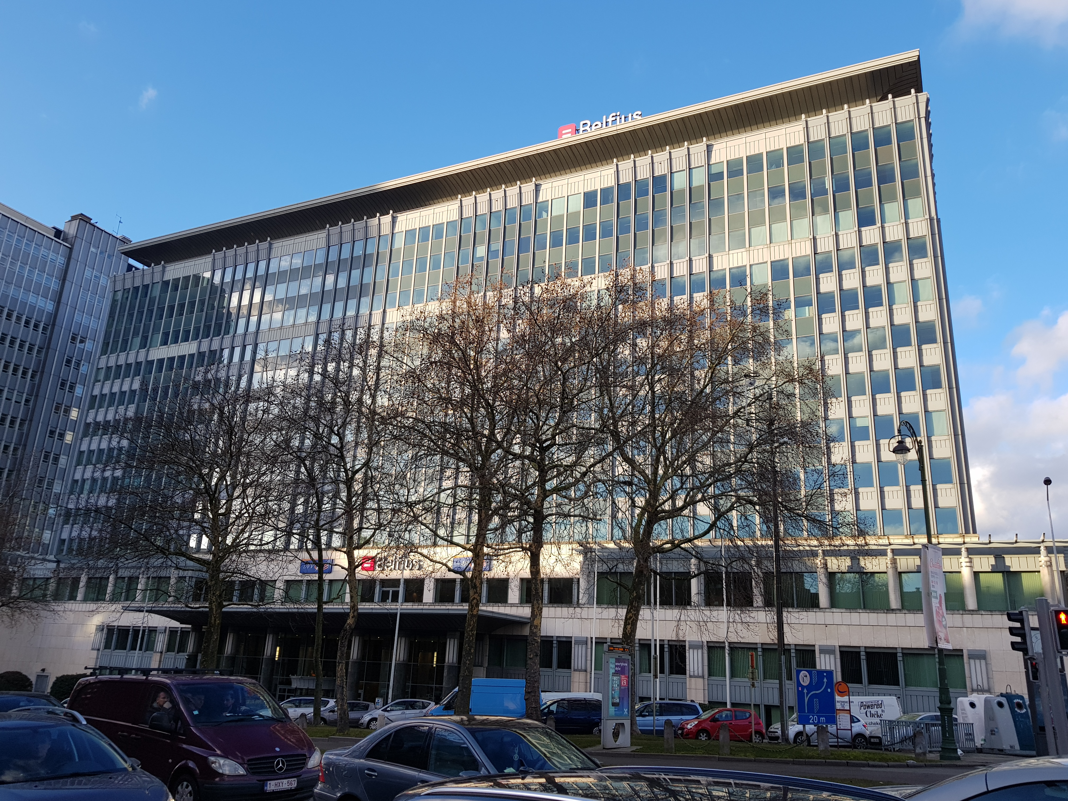 Galileigebouw, Brussel, België